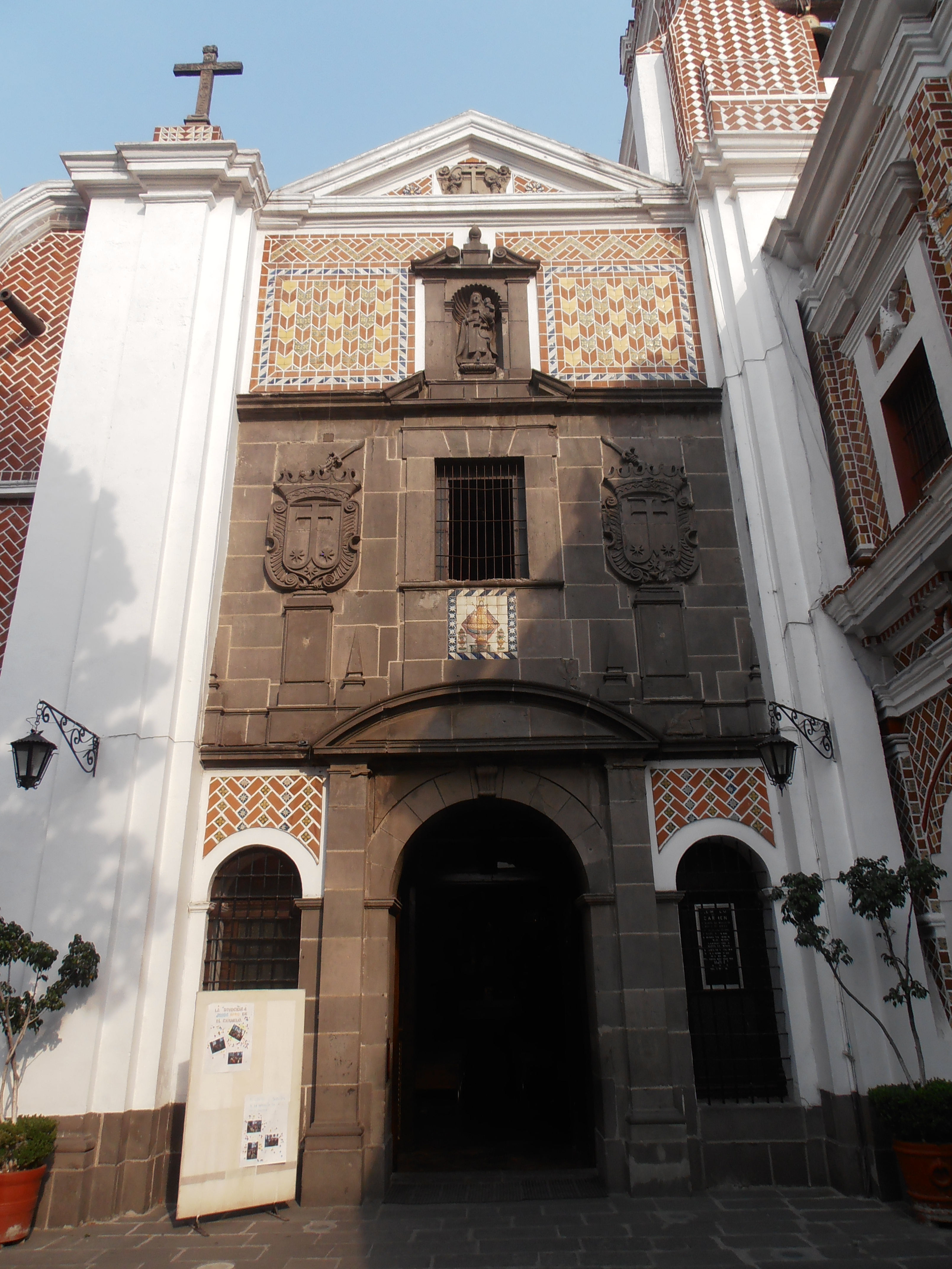 Puerta de entrada al templo del Carmen, Puebla